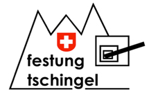 Logo des Vereins Festung Tschingel, Festungsraum Sargans, Schweiz